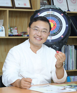 HANGUNG progenitor